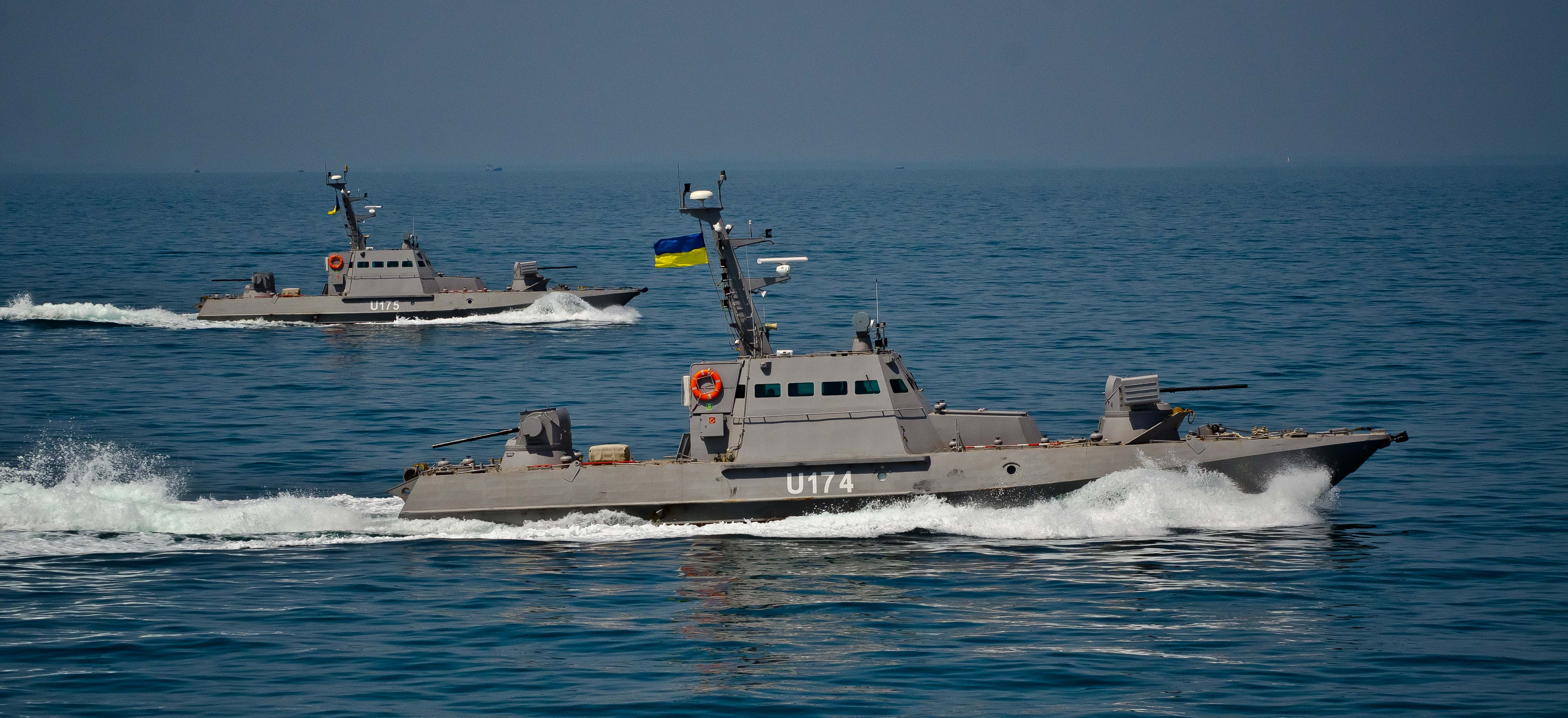 Майбутнє українського флоту - малі броньовані артилерійські катери "Бердянськ" (U-174) та "Аккерман" (U-175) під час ходових випробувань у відритому морі. Два новозбудовані для Військово-Морських Сил Збройних Сил України малі броньовані артилерійські катери в ході випробувань у відкритому морі здійснили спільне плавання. Під час виходу у складі тактичної групи катерів перевірено роботу систем і механізмів у штормових умовах. Матеріальна частина працювала в штатному режимі. Державні іспити та ходові випробування в морі тривають. Фото: Євген Силкін